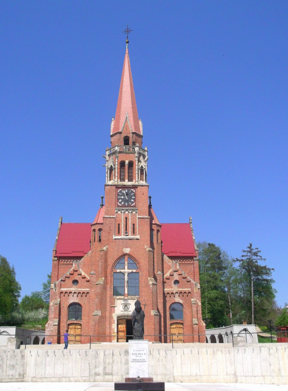 Rumunia, Kaczyka, kościół rzymskokatolicki